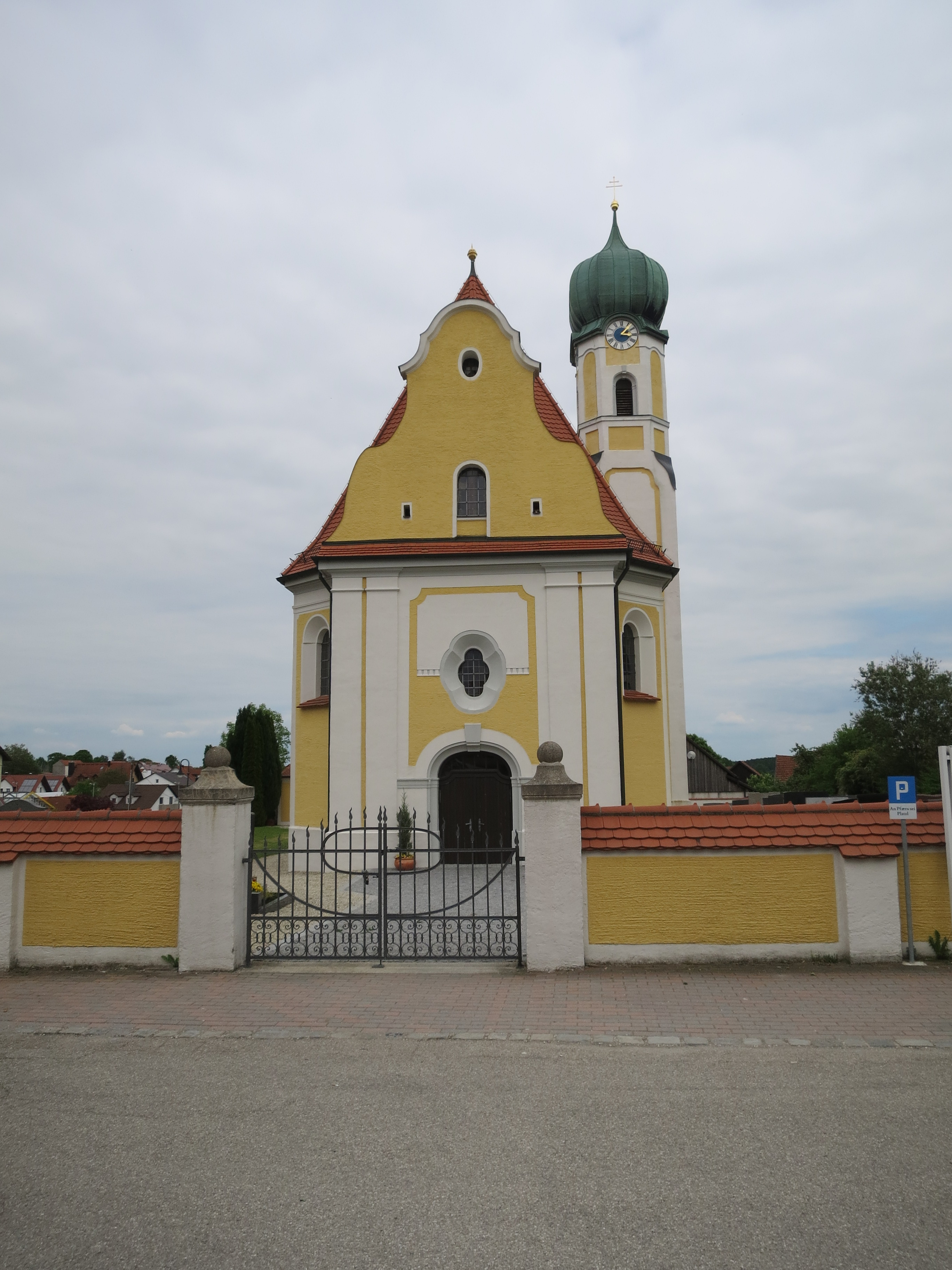 Eine neubarocke Kirche von Johann Baptist Schott aus dem Jahr 1908/09